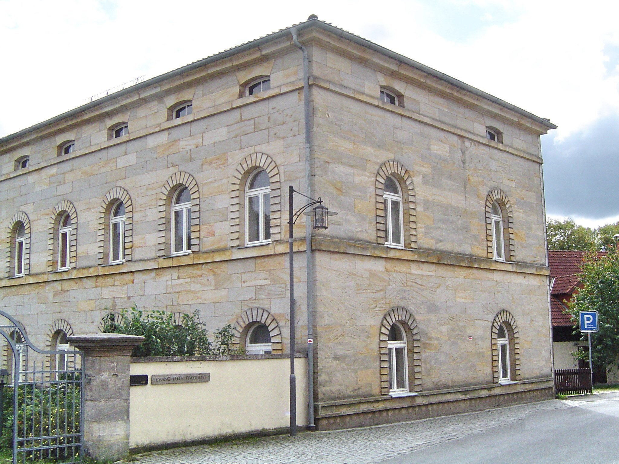 Eckersdorf - Evang.-Luth. Pfarramt (Kirchengemeinde, Gemeindehaus), Eckehartstraße 23, Zweigeschossiger Sandsteinquaderbau im sogenannten Rundbogenstil mit Mezzaningeschoss, Walmdach, erste Hälfte 19. Jahrhundert. This is a photograph of an architectural monument.